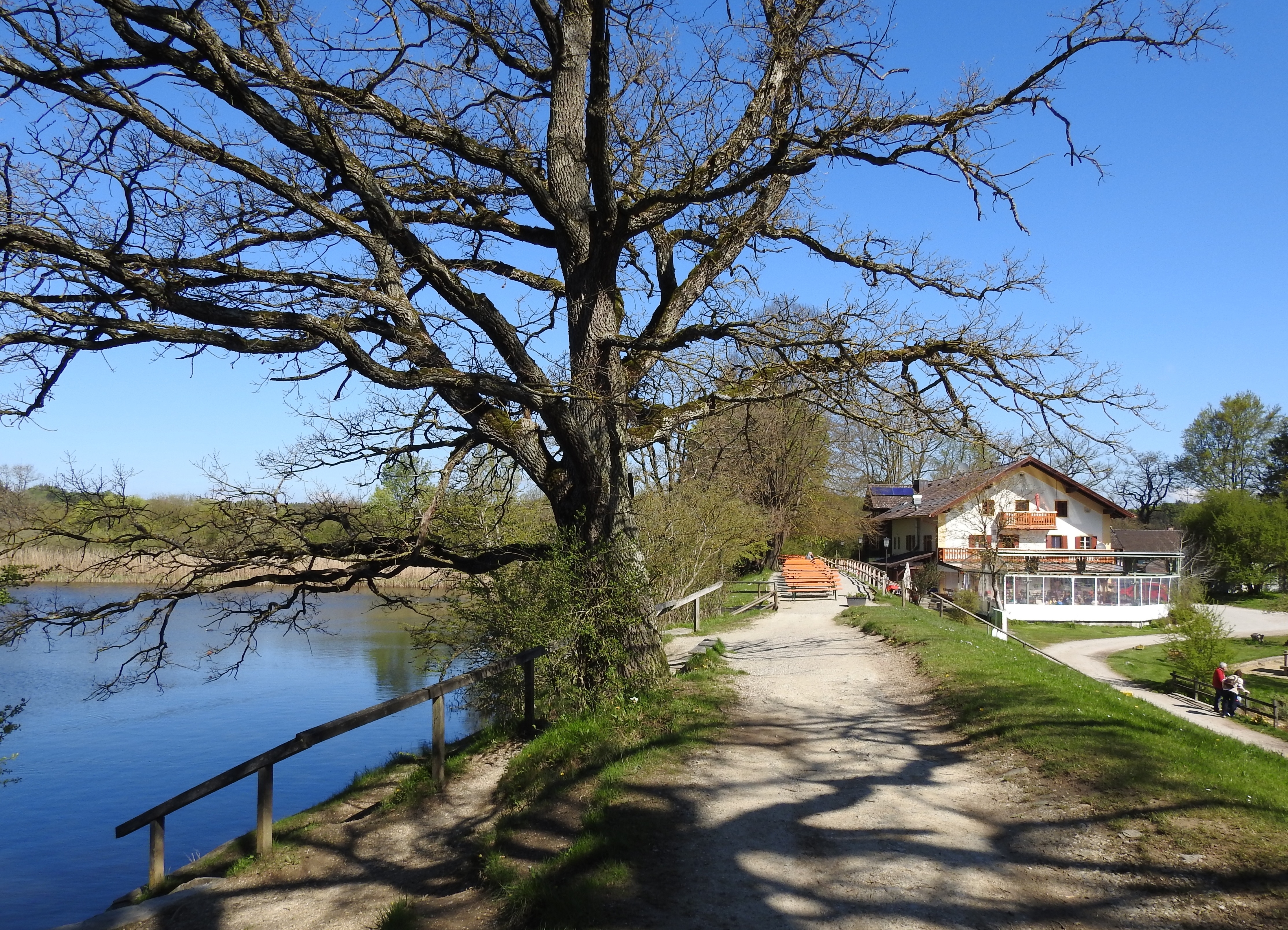 Pöcking, OT Maising, Naturschutzgebiet Maisinger See.